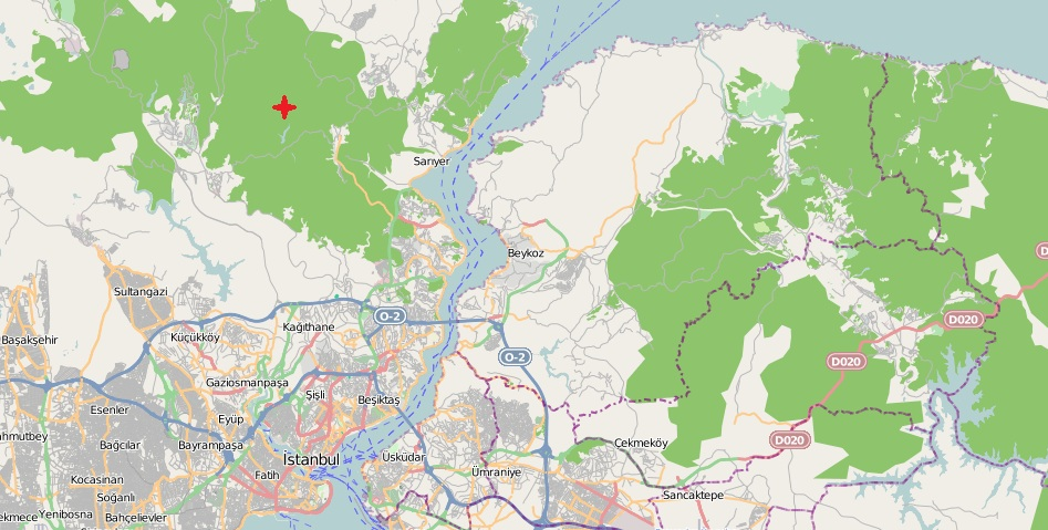 Belgrad Ormanı'nın konumu